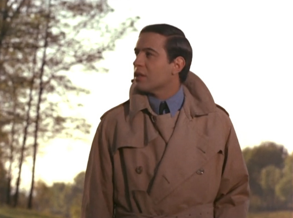 Screenshot dal film Questi pazzi, pazzi italiani (1969)